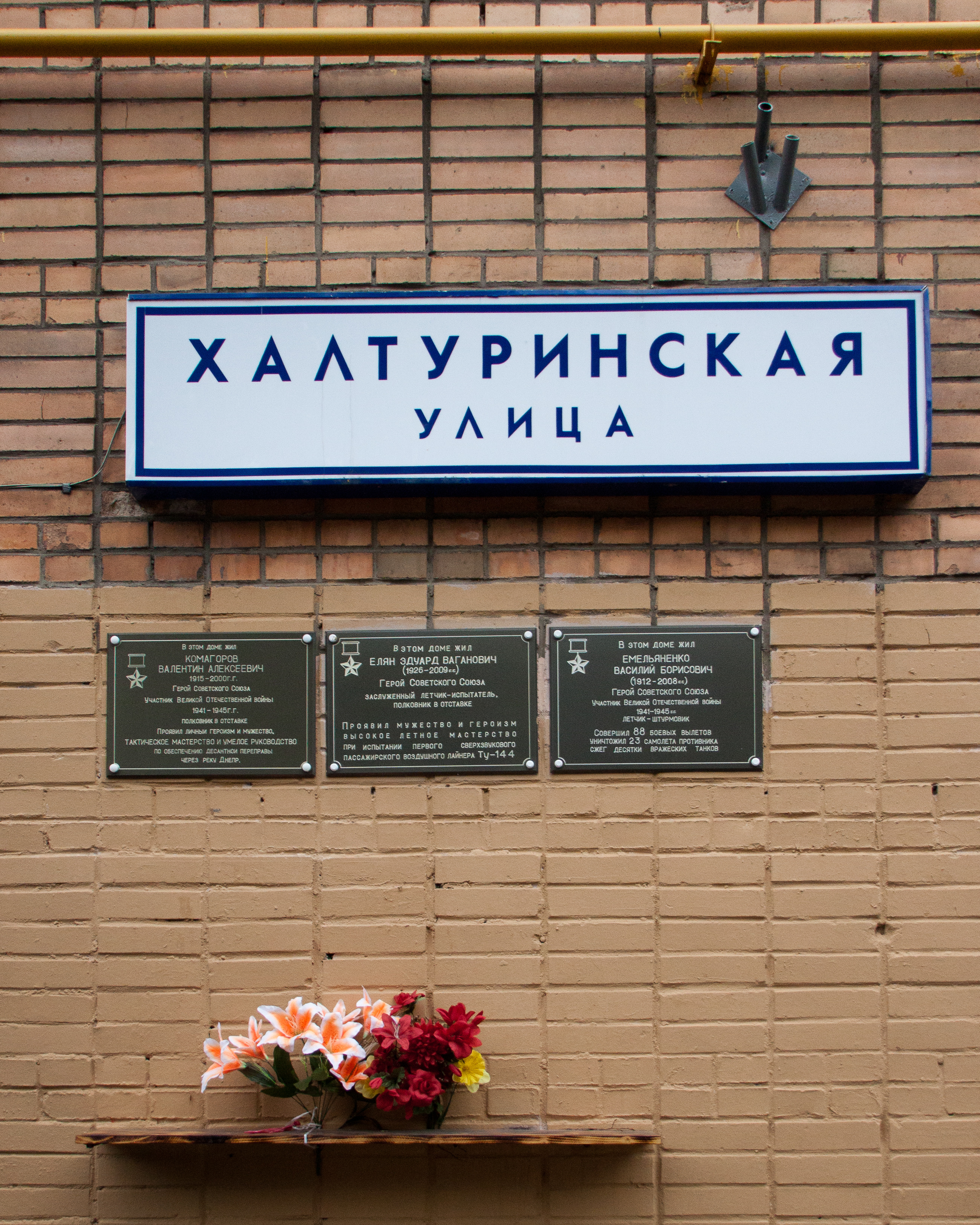 Памятные доски по адресу Москва, ул. Просторная, д.14, корп.1 в честь Героев Советского Союза Валентина Комагорова, Эдуарда Еляна и Василия Емельяненко